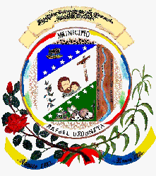 Escudo del municipio Rafael Urdaneta. Estado Táchira. Venezuela